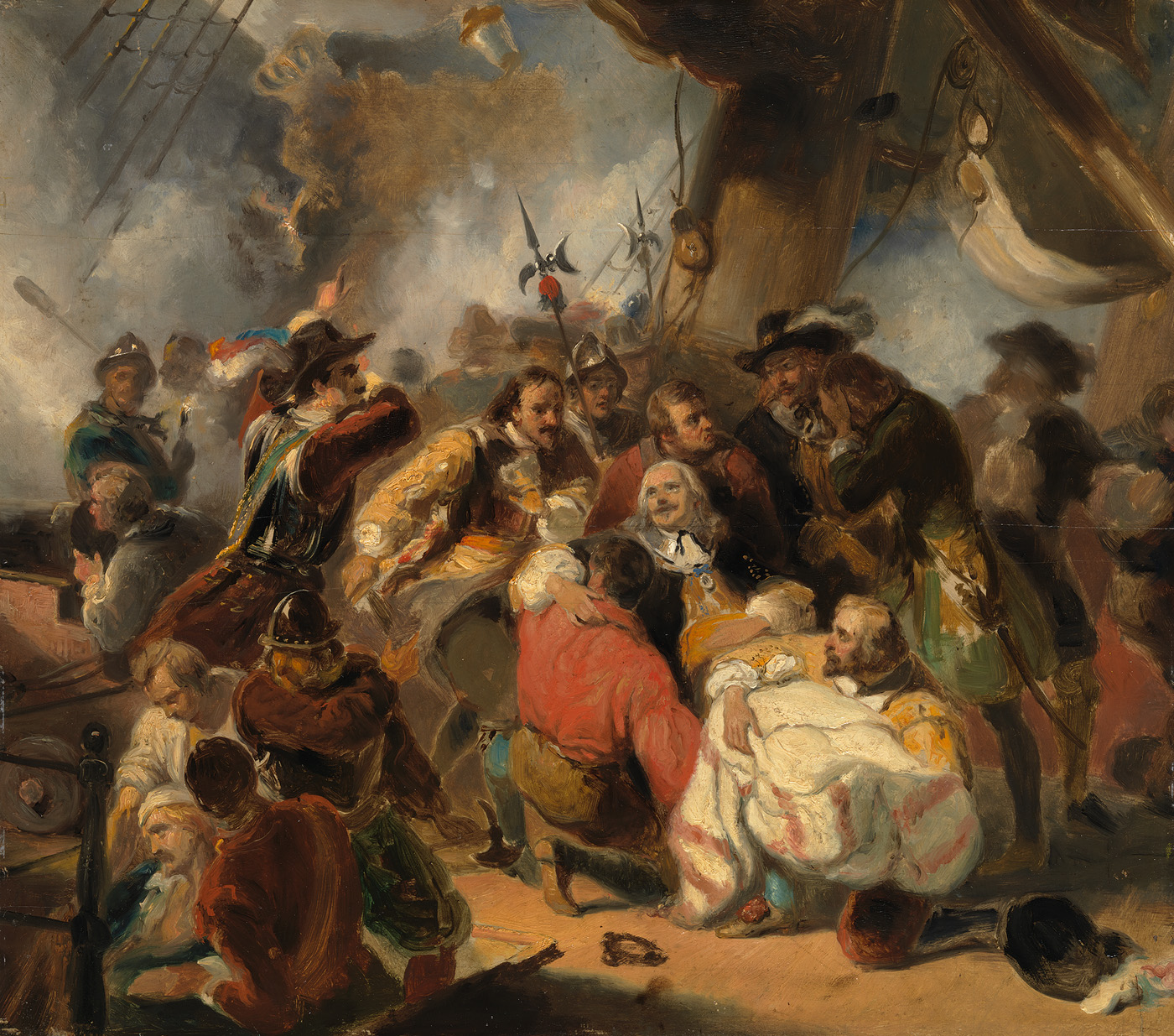 schilderij; Vos, Jacob de; geschiedenis (iconografie)